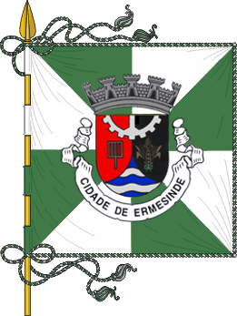 A Bandeira com o brasÃ£o e fundo verde e branco da cidade de Ermesinde.